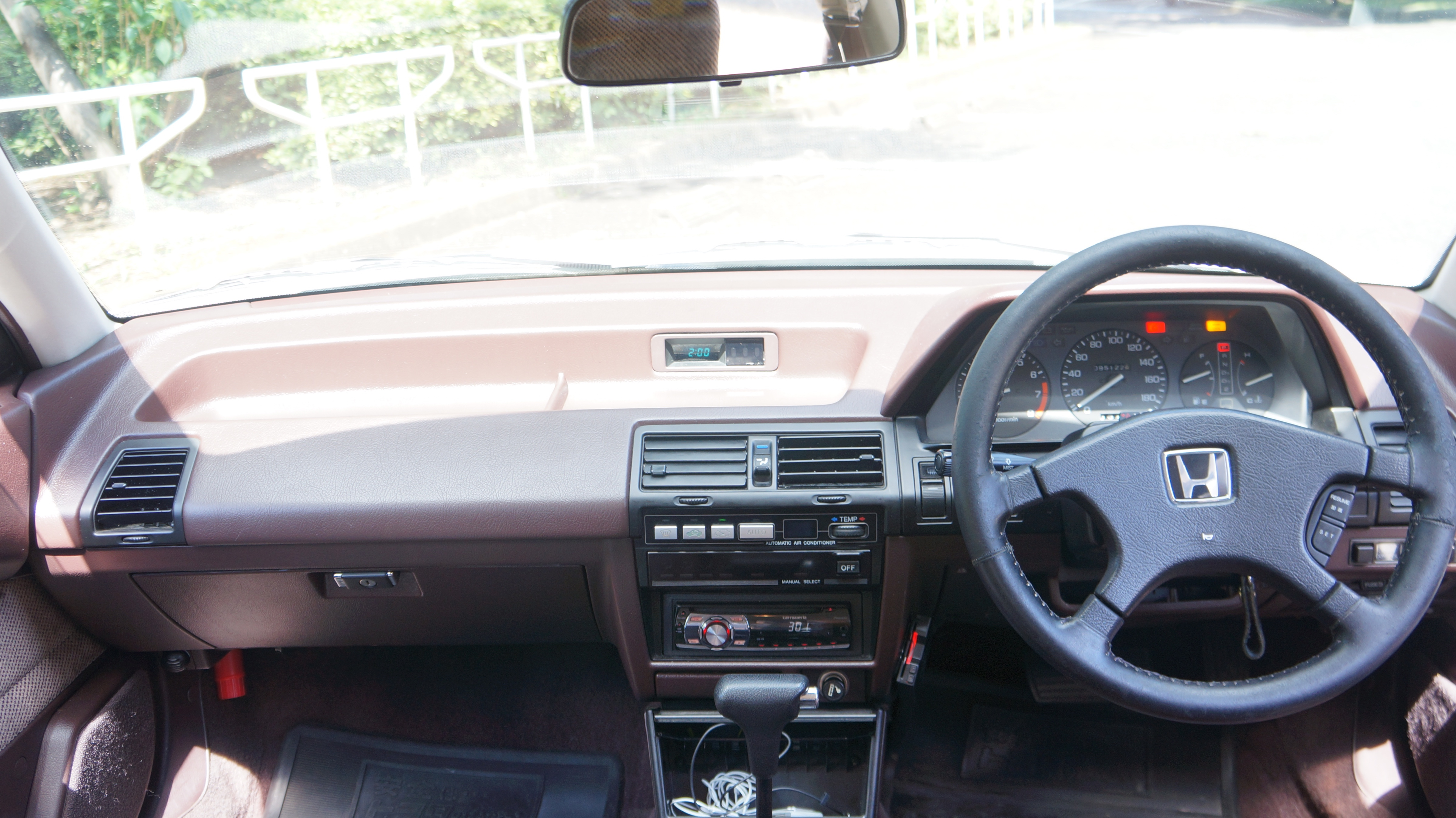 ホンダ アコード 1985年 インテリア